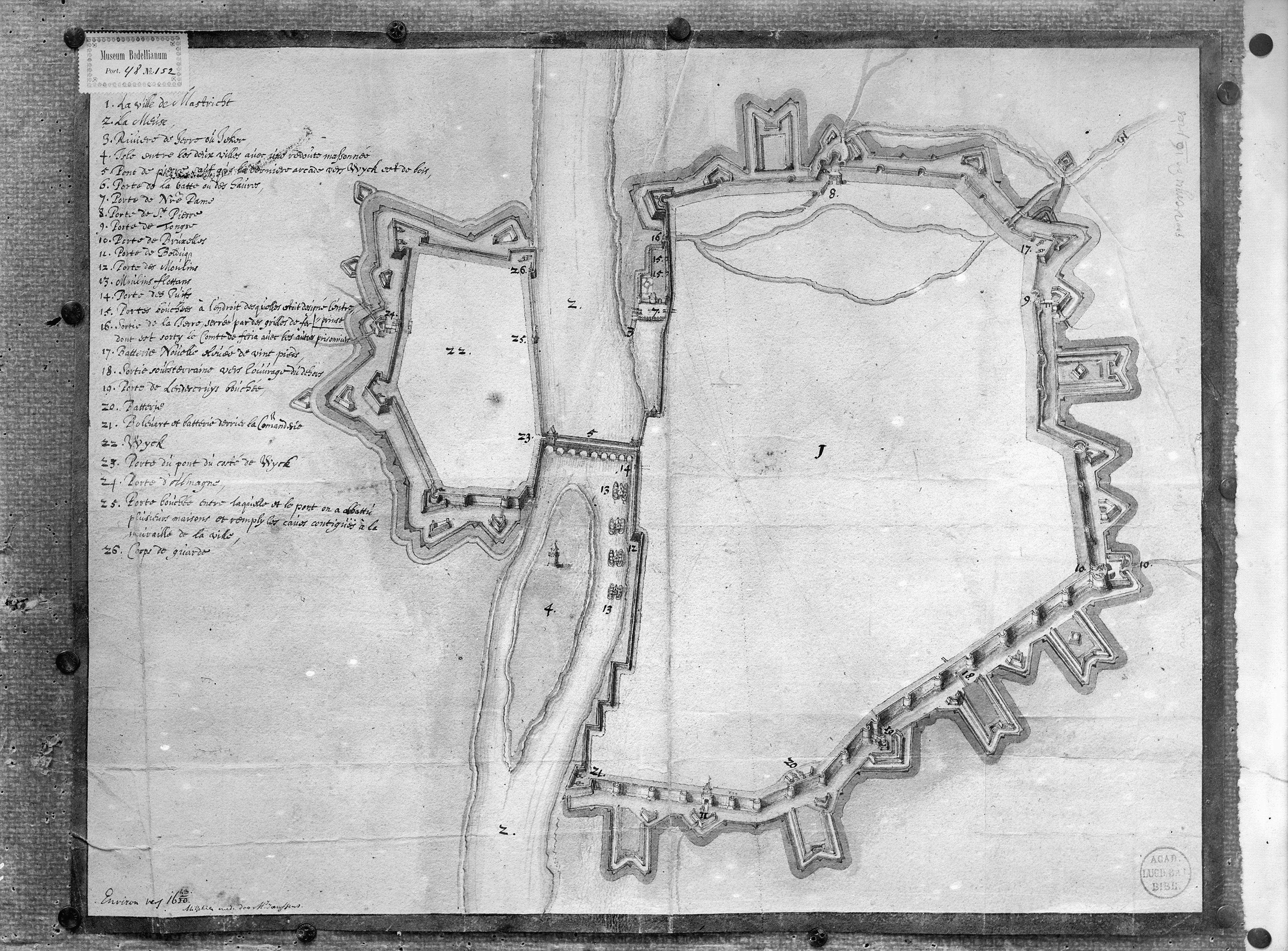 Vestingwerken: plattegrond der vestingwerken plm. 1643, in de verzameling Bodel Nijenhuis in de Universiteits bibliotheek Leiden